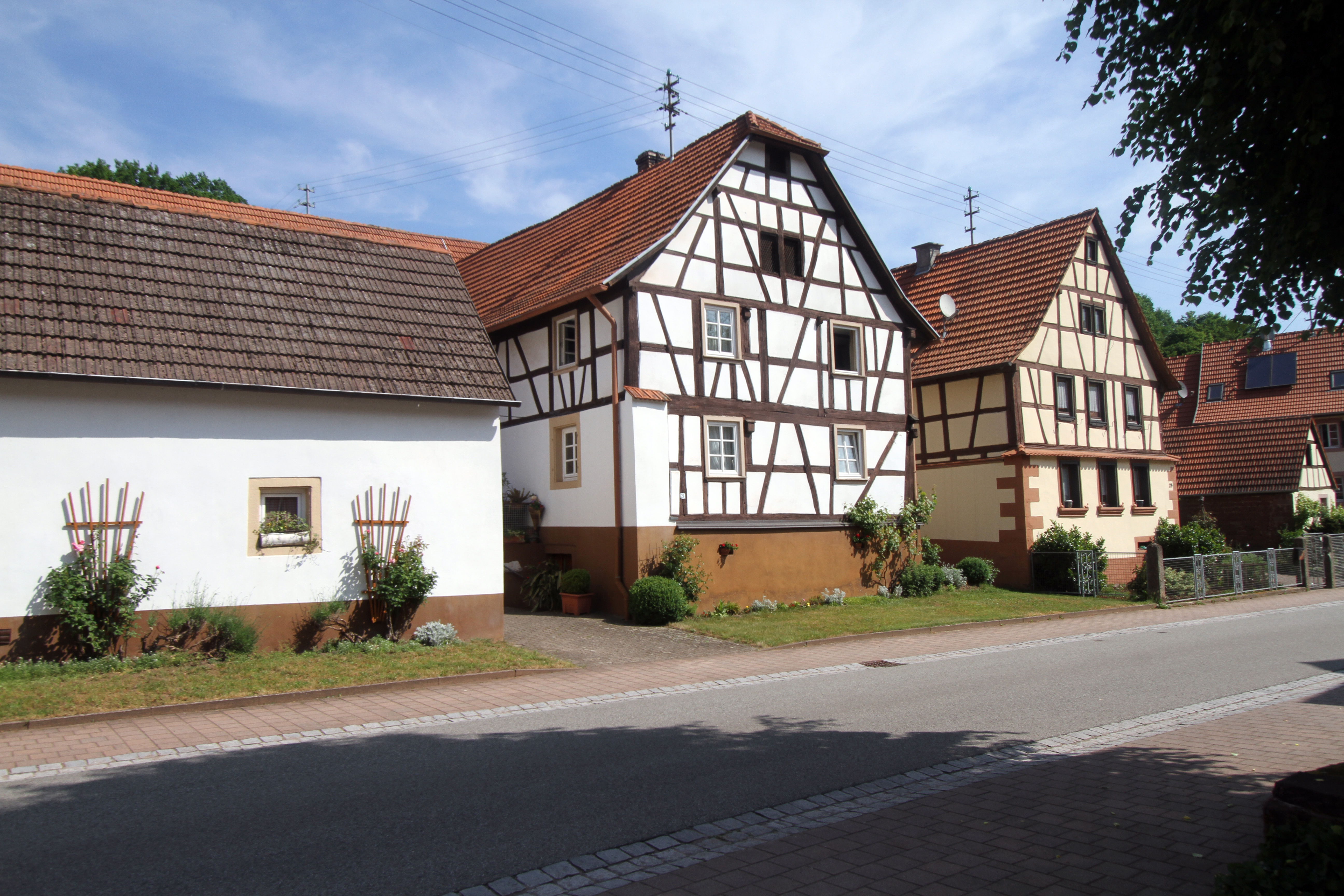 Denkmalgeschütztes Haus in Rumbach.